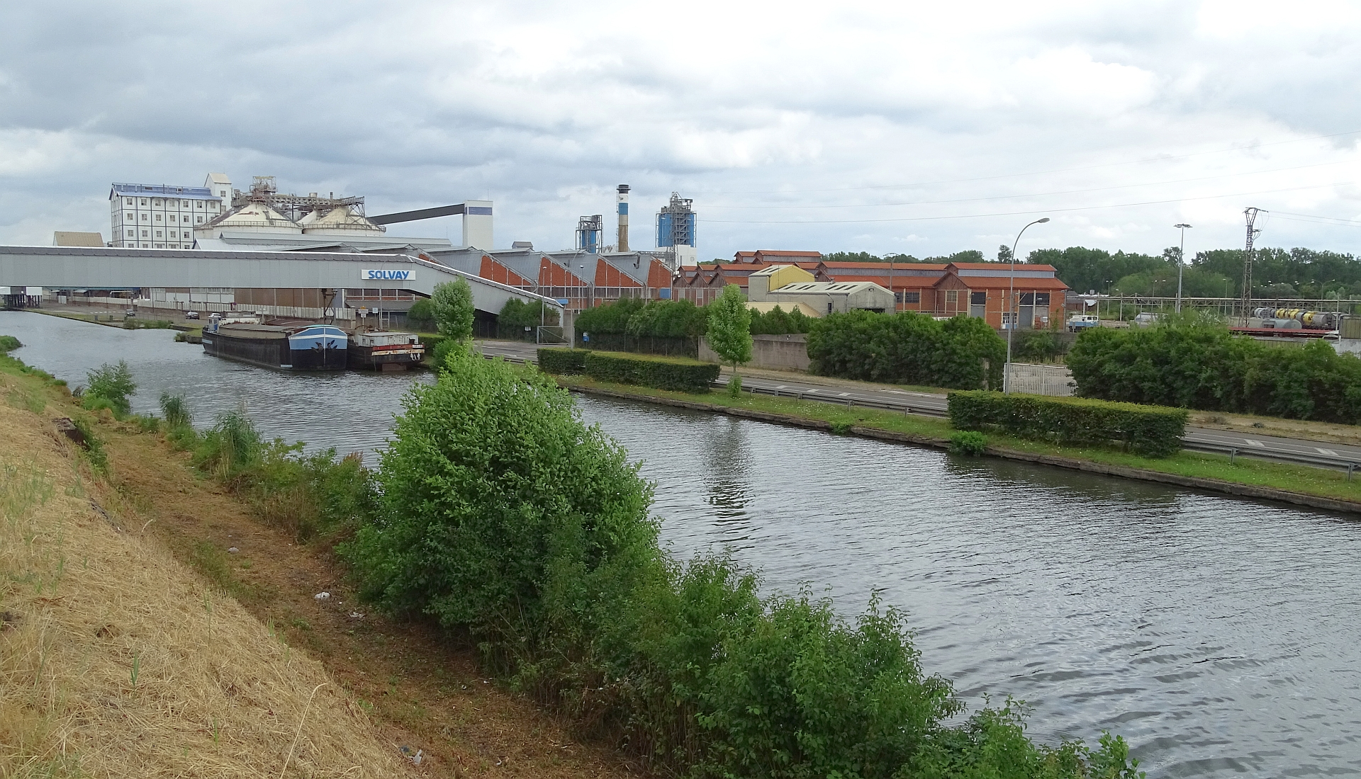 Solvay in Dombasle-sur-Meurthe, 28.07.2019